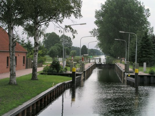 Schleuse von Banzkow (Mecklenburg)